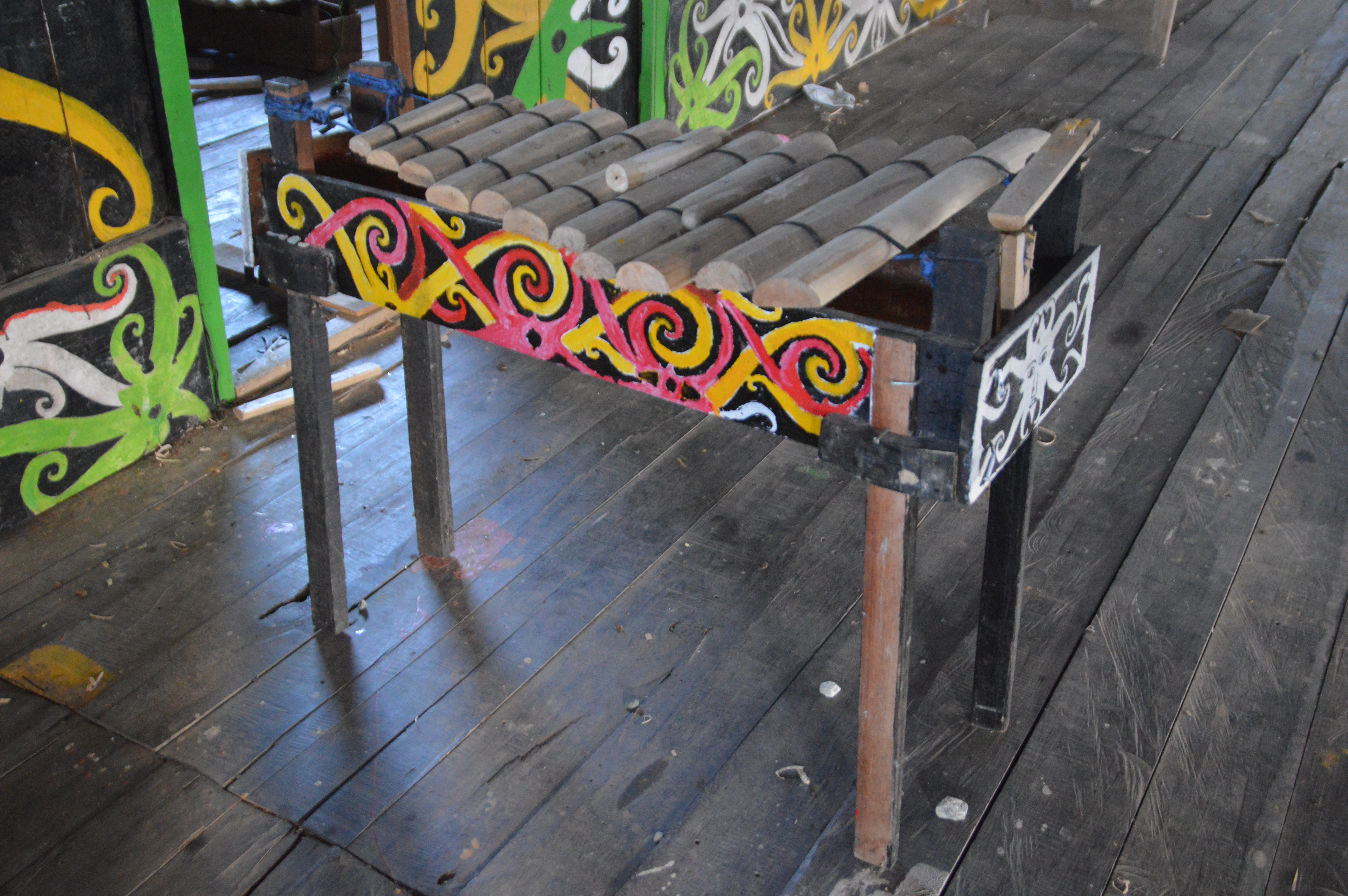 Jatung Utang, alat musik tradisional Dayak Kenyah.